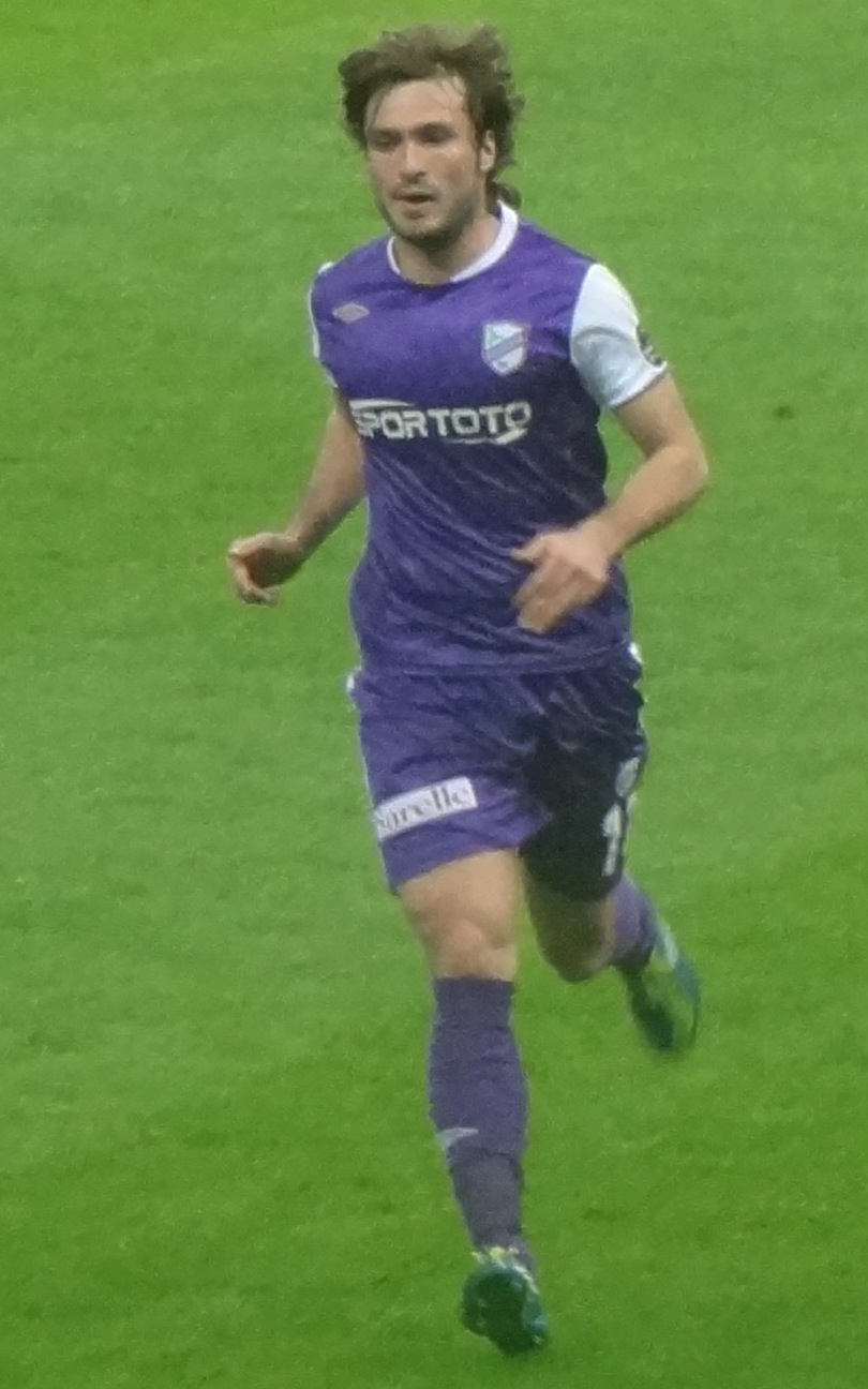 Onur Tuncer GS Karşısında